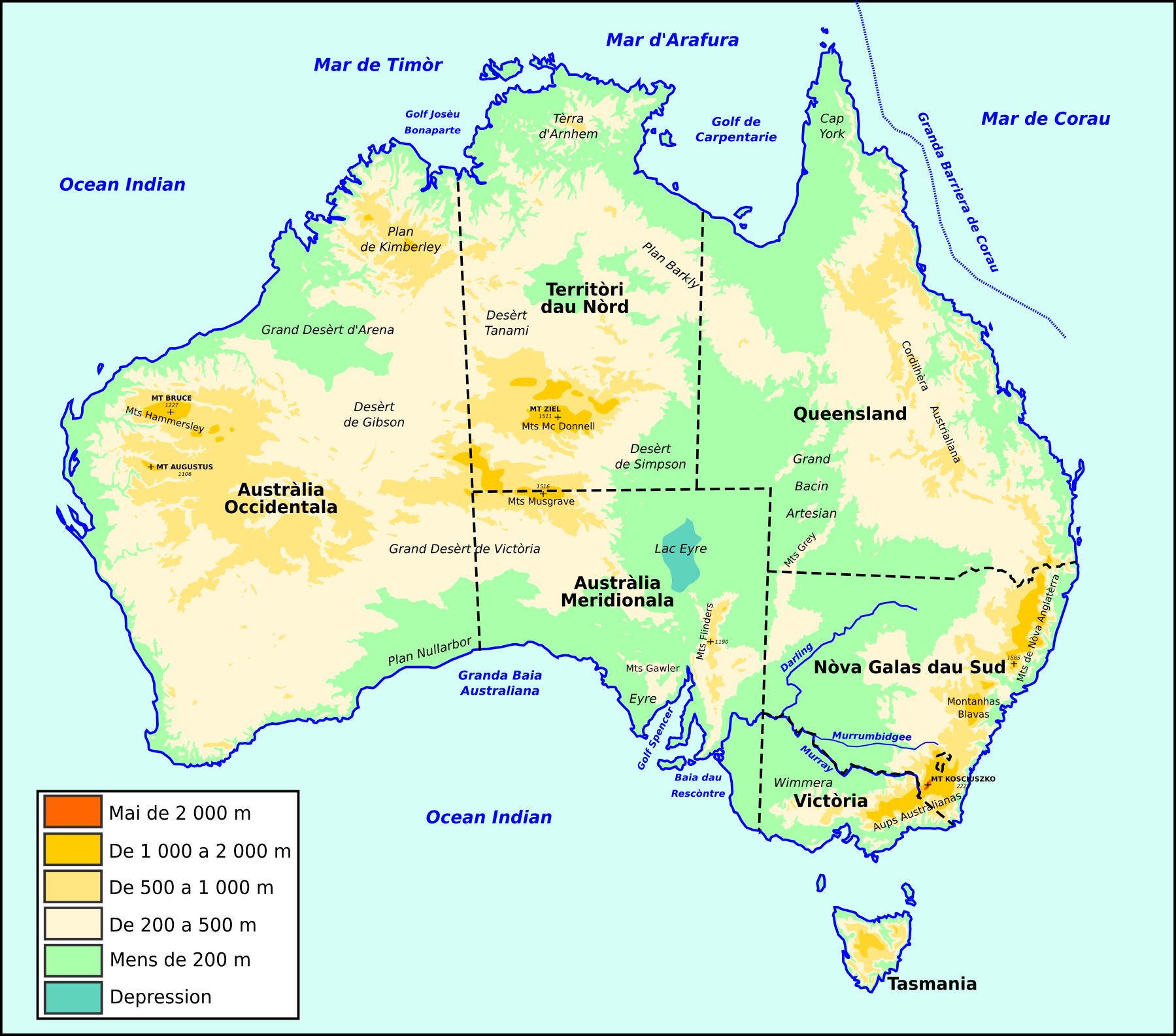 Topografia simplificada d'Austràlia